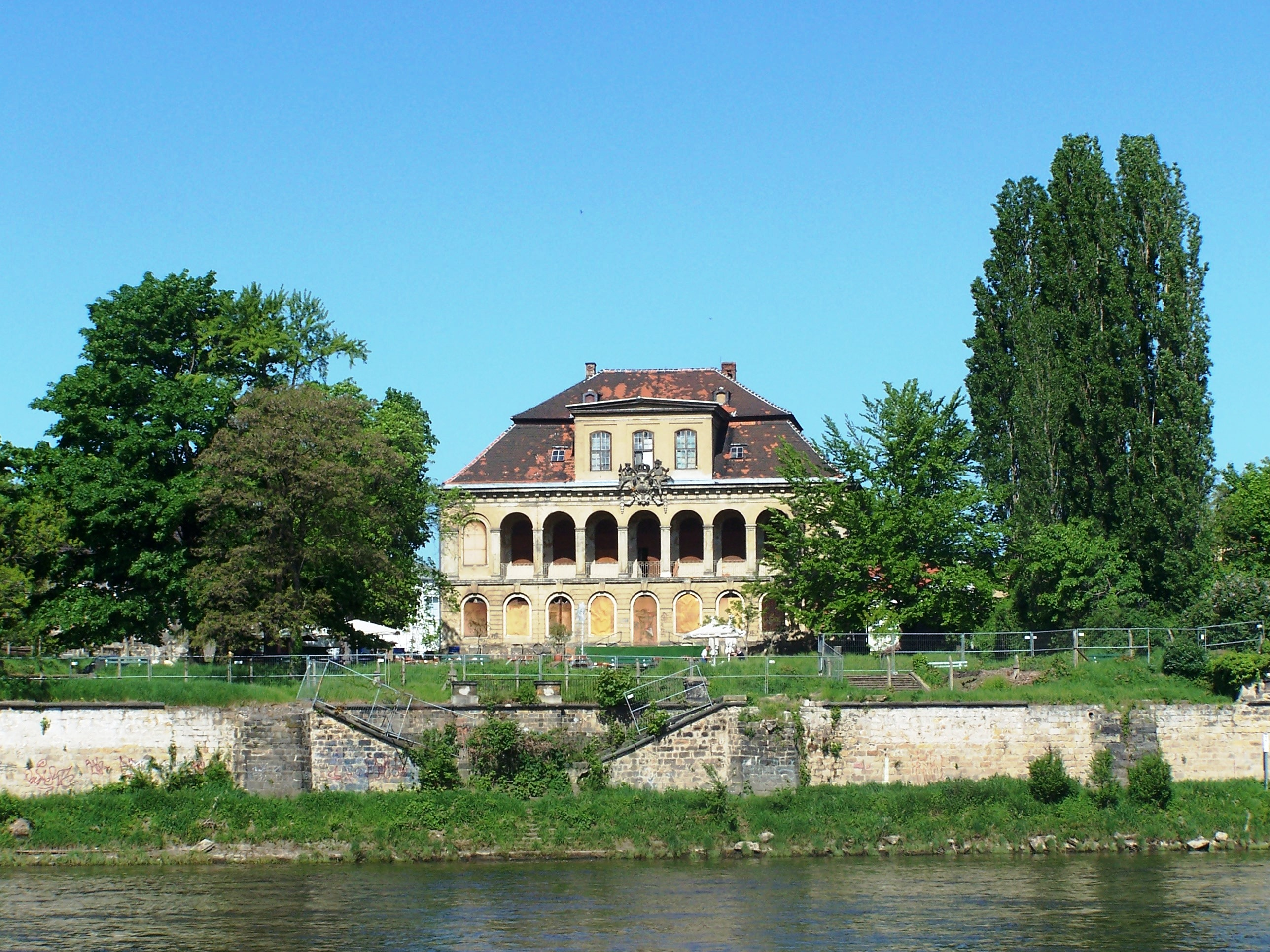 Schloss Übigau von der anderen Elbseite aus